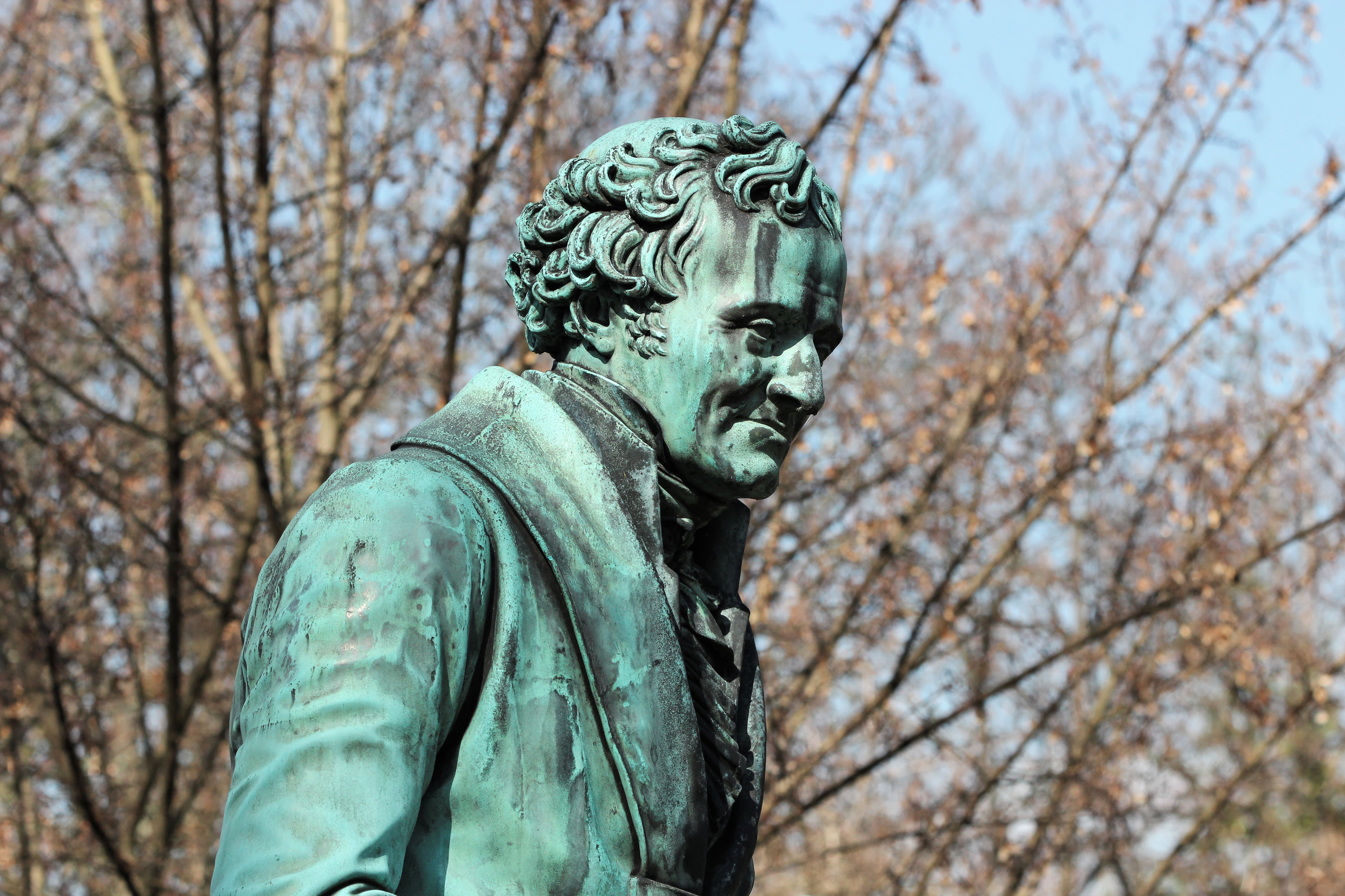 Sépulture de Dominique Vivant Denon (1747-1825), graveur, écrivain, diplomate et administrateur. Statue en bronze d'un homme assis représentant Denon. À l'origine la statue tenait un crayon dans sa main droite.